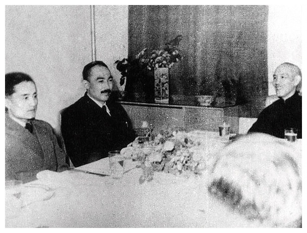 1946年11月22日，蒋介石（右）在南京接见前来参加国民大会的阿合买提江（中）、阿巴索夫（左）。